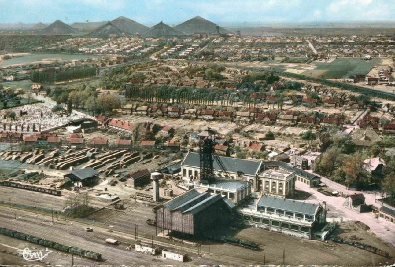 La fosse n° 9 de la Compagnie des mines de Lens était un charbonnage du bassin minier du Nord-Pas-de-Calais constitué d'un seul puits situé à Lens, Pas-de-Calais, Nord-Pas-de-Calais, France.